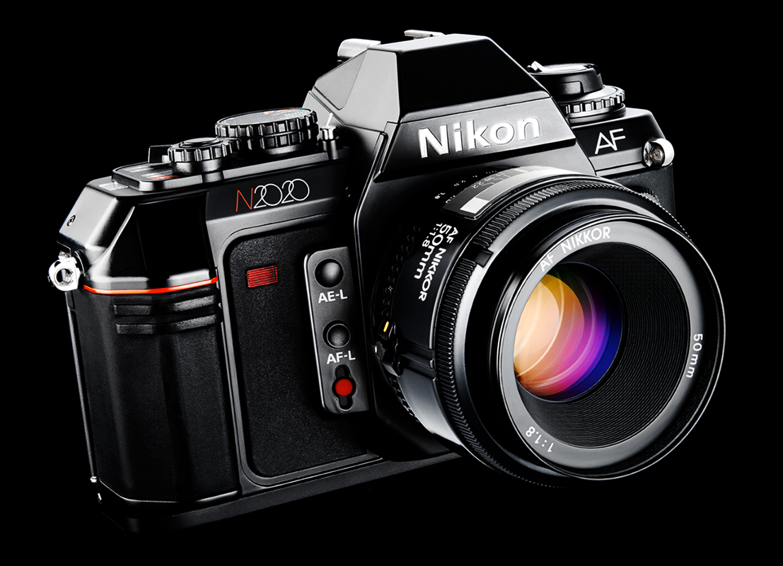 Nikon N2020 Camera